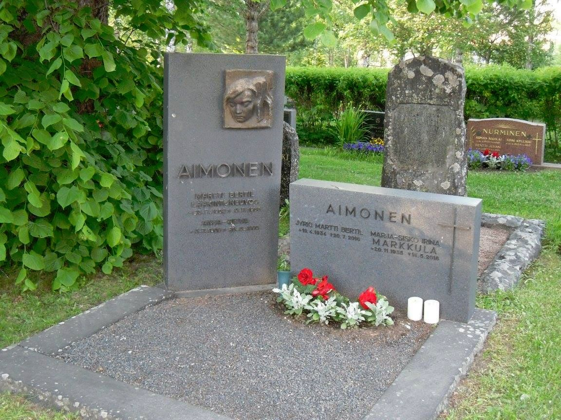 Lääkintöneuvos Martti B. Aimosen perhehauta Ikaalisten hautausmaalla